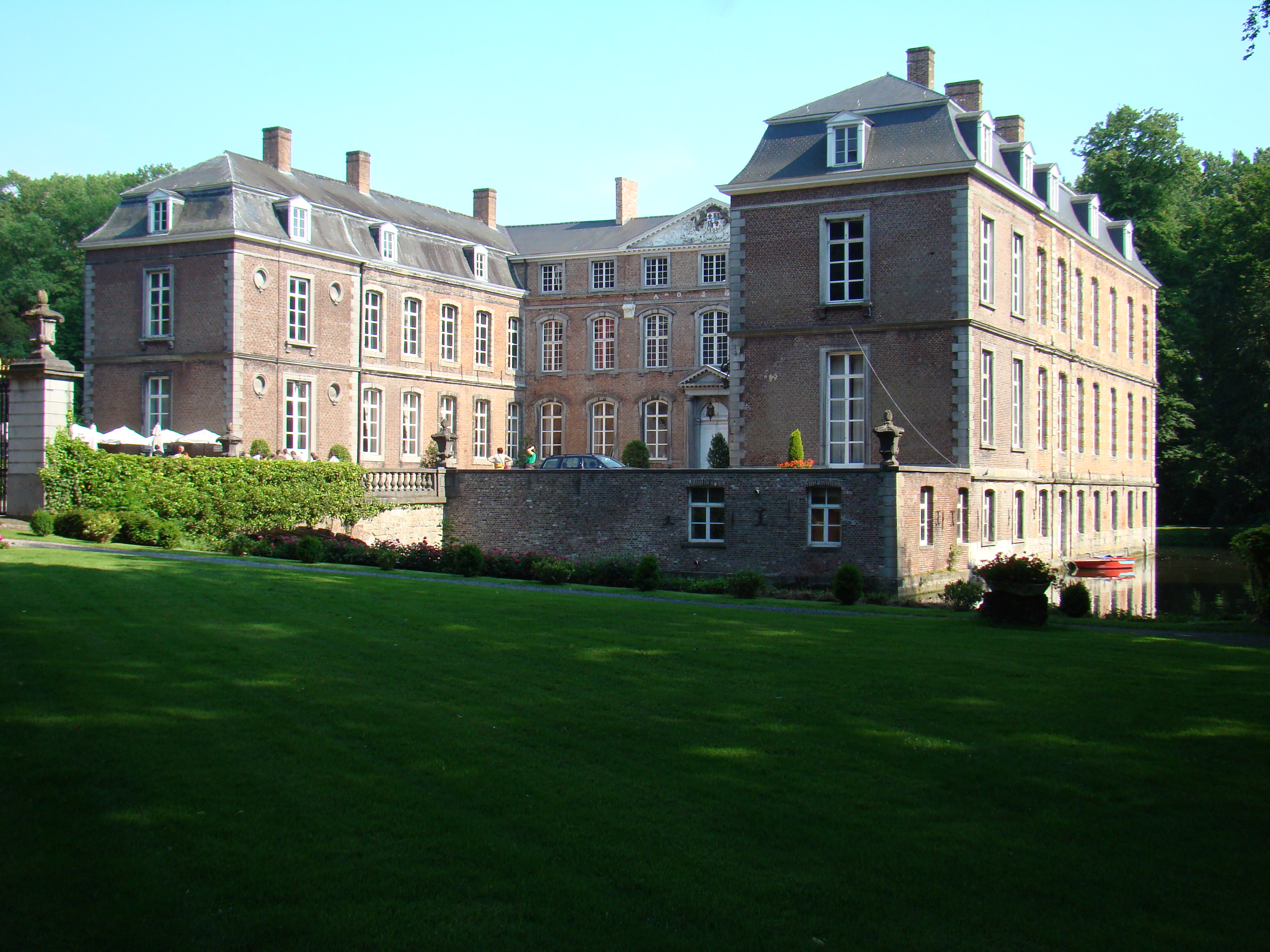 Kasteel naast de markt van Ingelmunster Castle next the market of Ingelmunster, West Flanders, Belgium